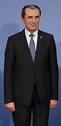 Victor Ponta la Summit-ul Premierilor din Europa Centrala si de Est - China, Bucuresti